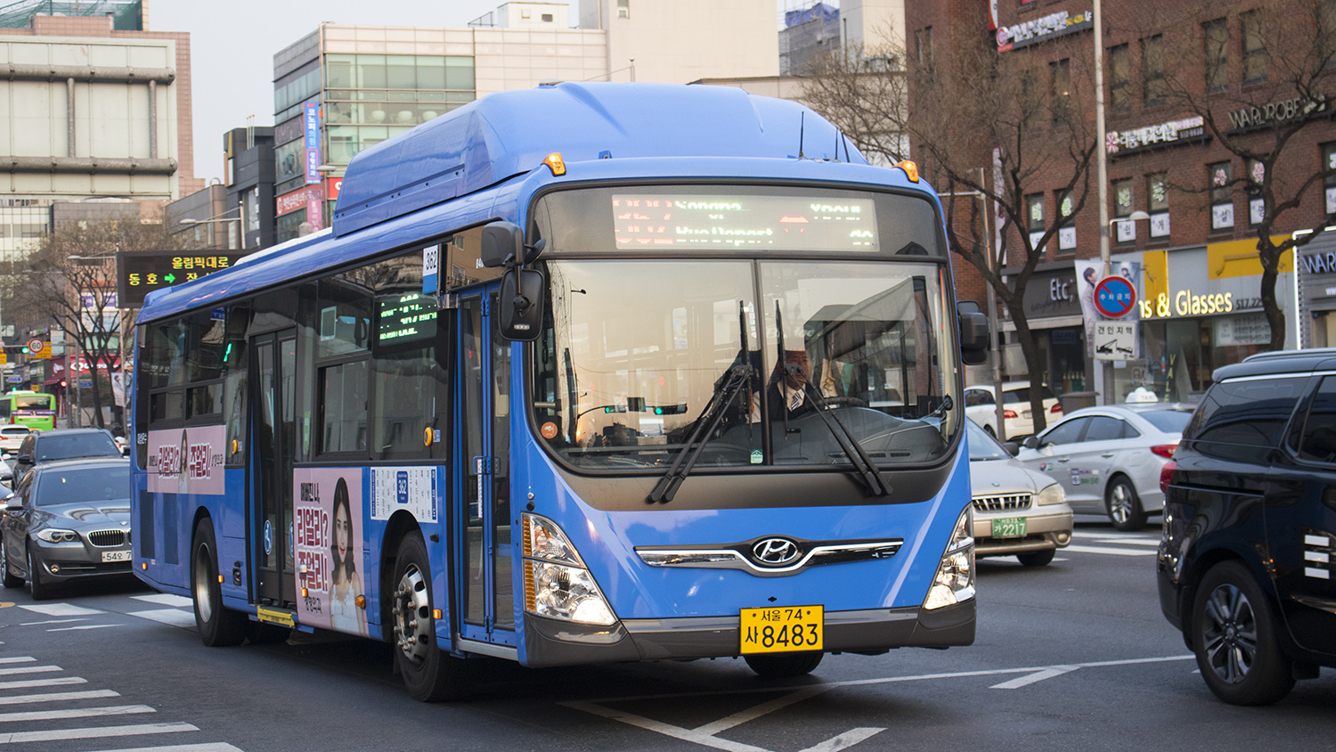 대성운수 362번 2018년식 현대 저상 뉴 슈퍼 에어로시티 F/L 개선형